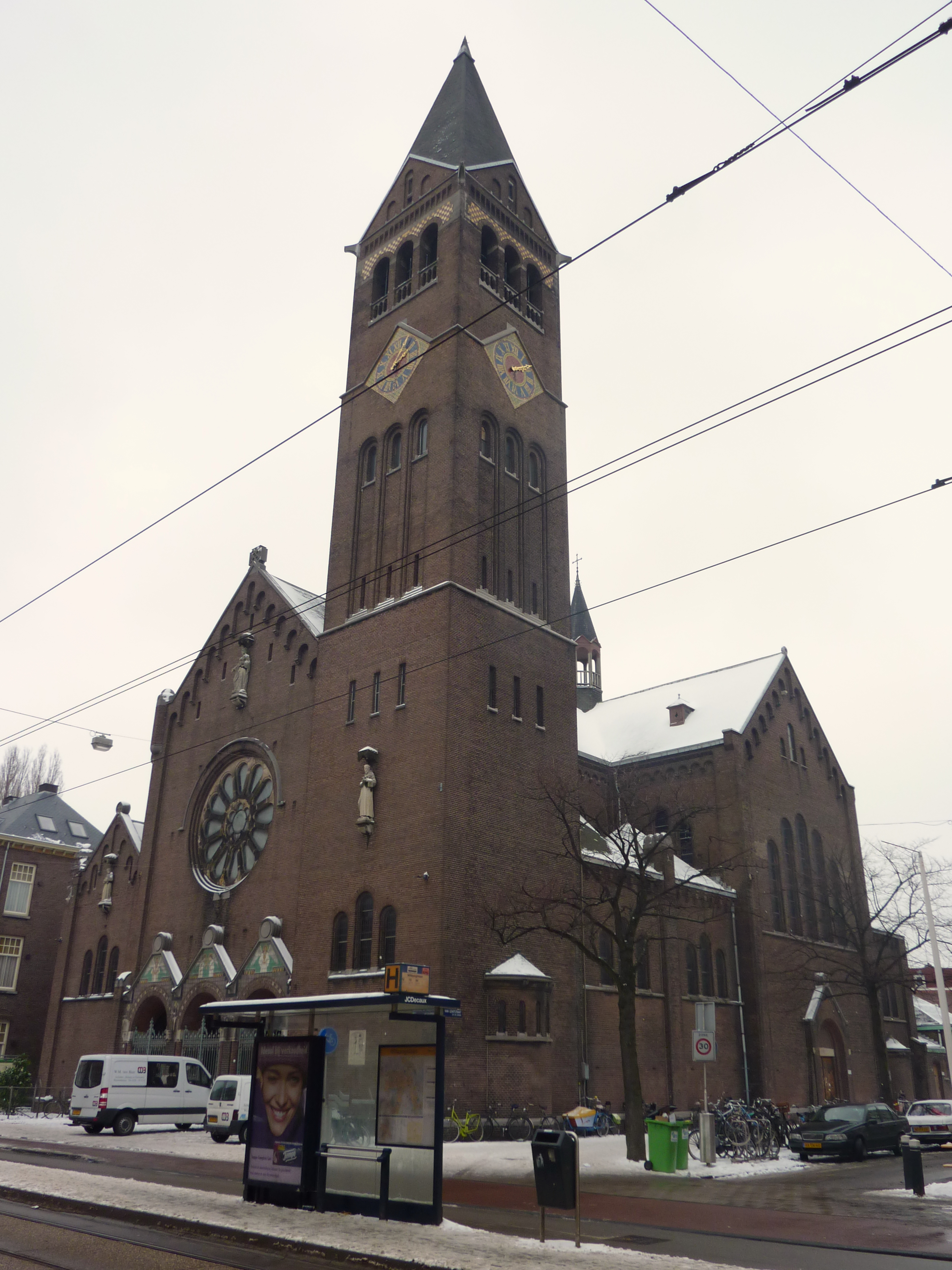 Amsterdam, St._Franciscus_van_Assisi, Admiraal de Ruyterweg